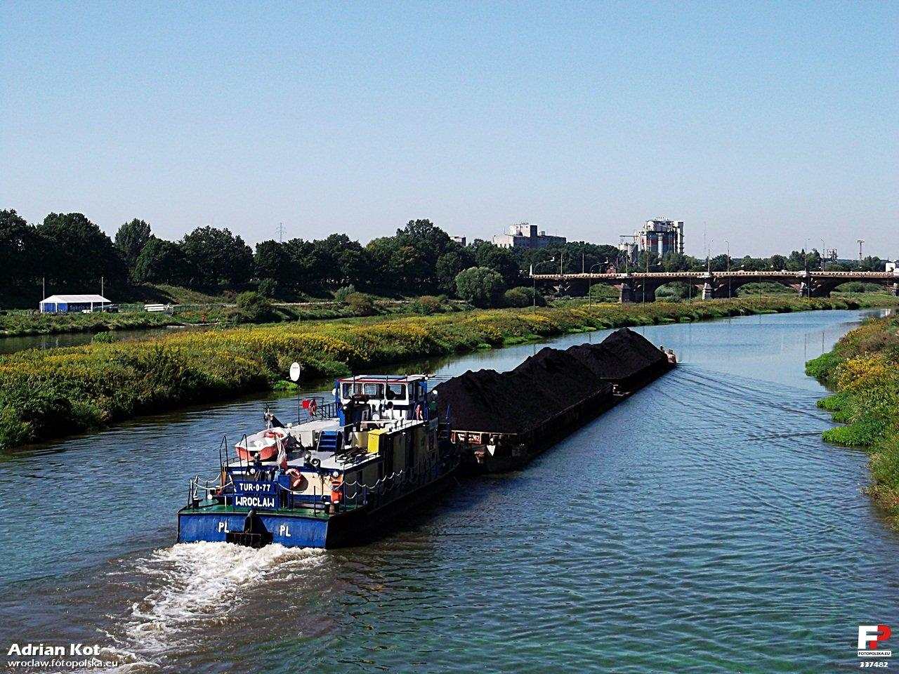 Pchacz TUR-0-77 dzielnie pcha węgiel po Odrze.